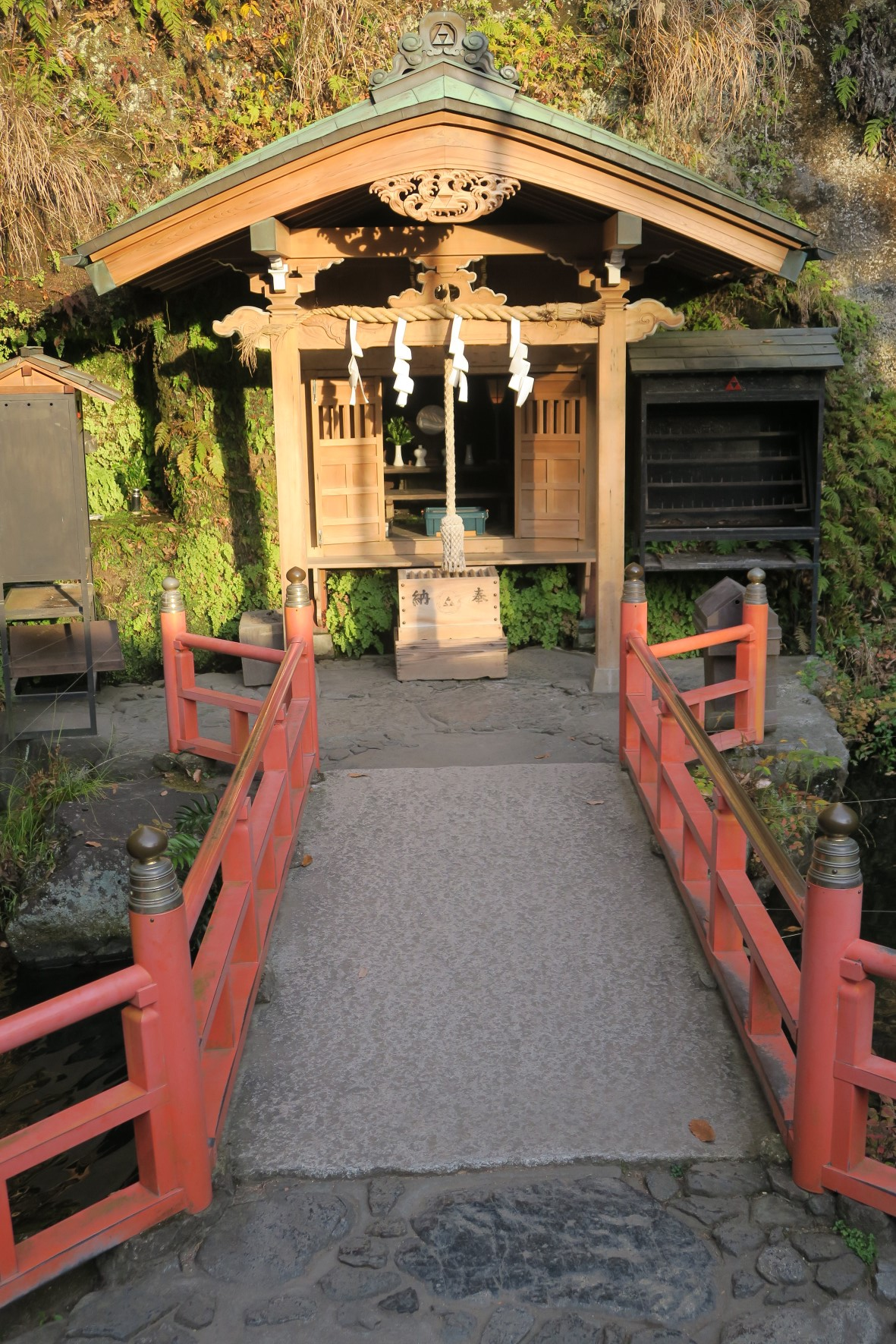 Shrine at Zeniarai Benten